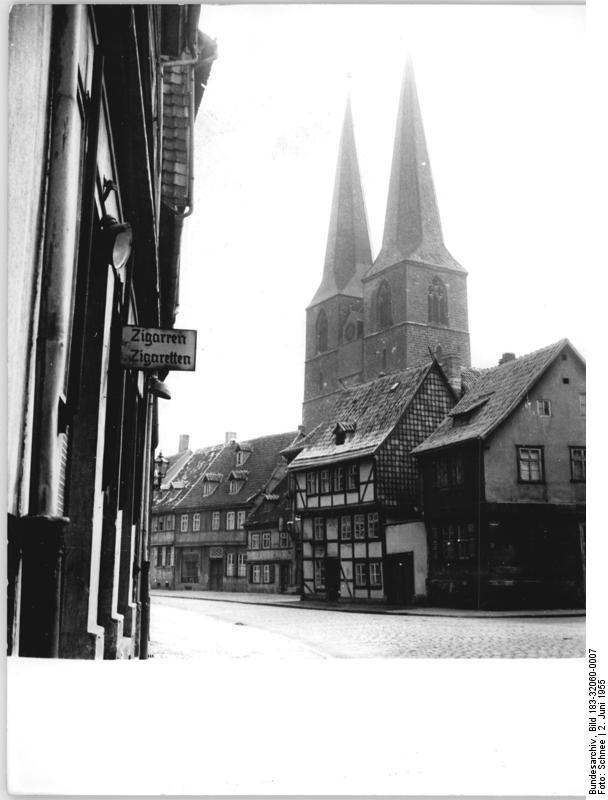 Quedlinburg, Altstadt, Nicolai-Kirche Zentralbild Schnee Ro-Ke. 2.6.1955 Schöne deutsche Heimat QUEDLIBURG: Altstadt Nicolai-Kirche Information added by Wikimedia users.